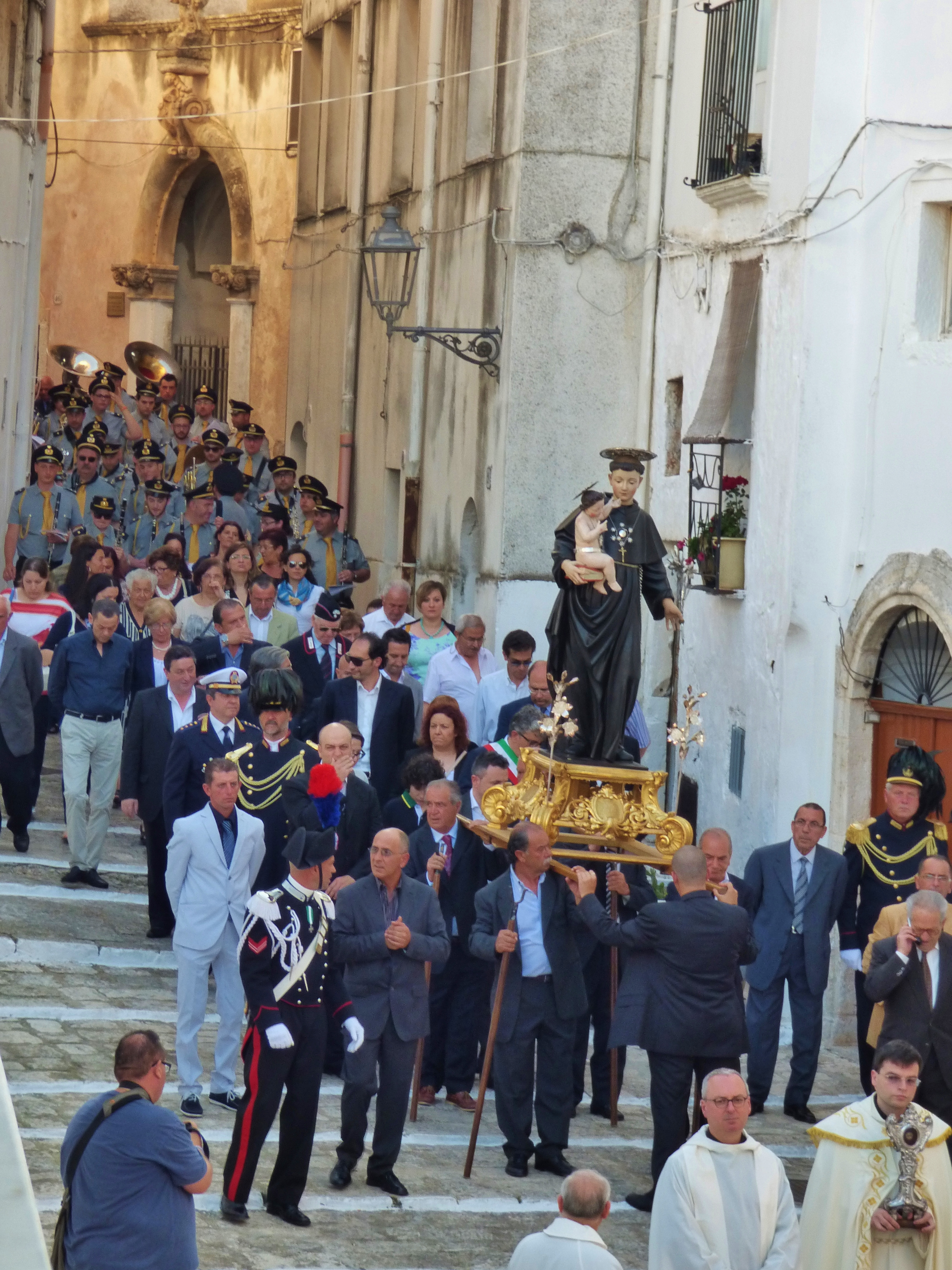 La foto ritrae il passaggio della processione di Sant'Antonio, patrono di Ceglie Messapica, in una strada del centro storico. In particolare sono visibili la statua lignea settecentesca e il reliquiario che ogni anno vengono portati in processione il 13 giugno